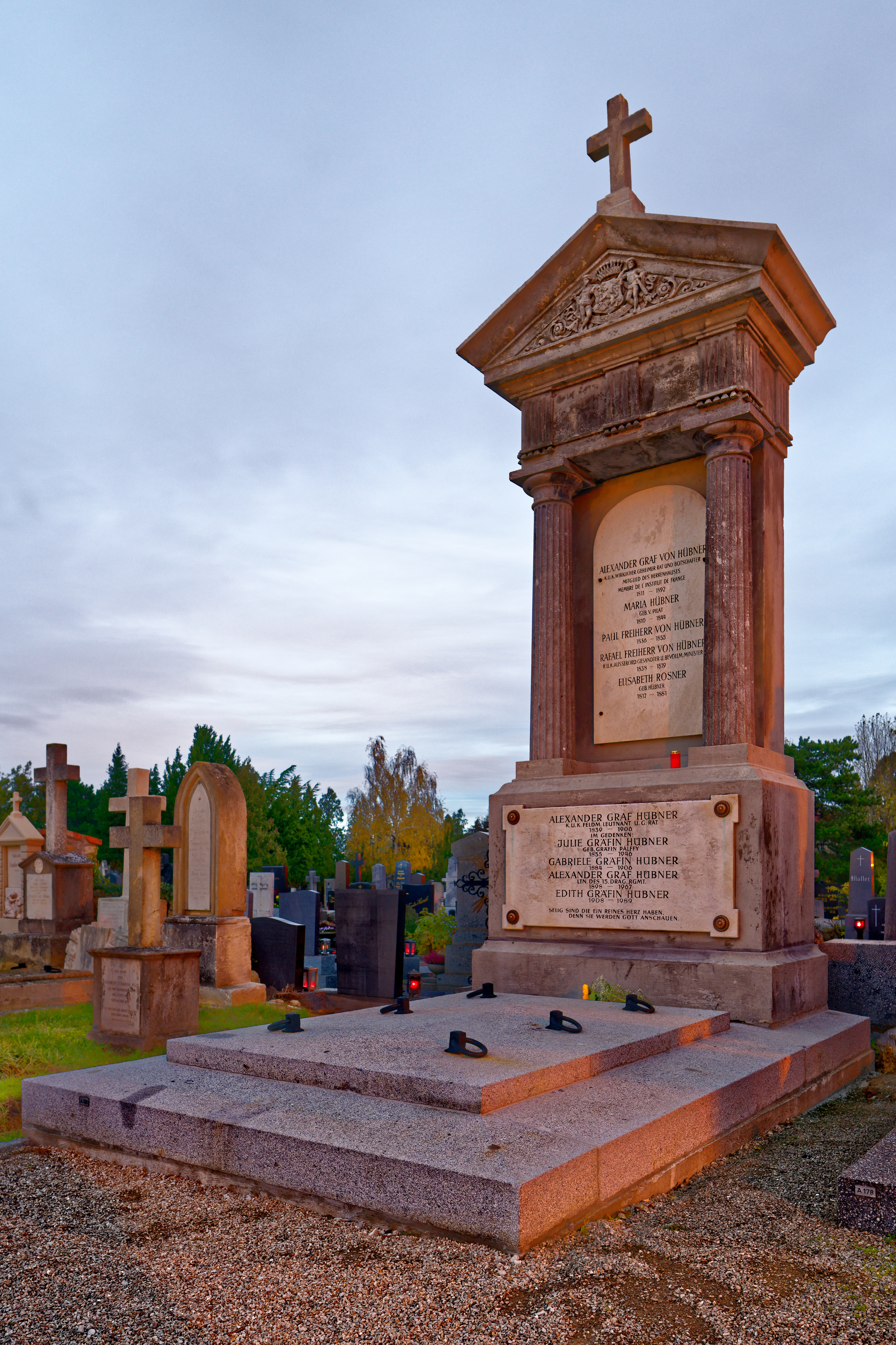 Gruftgrab der Familie Alexander Graf von Hübner auf dem Romantikerfriedhof Maria Enzersdorf